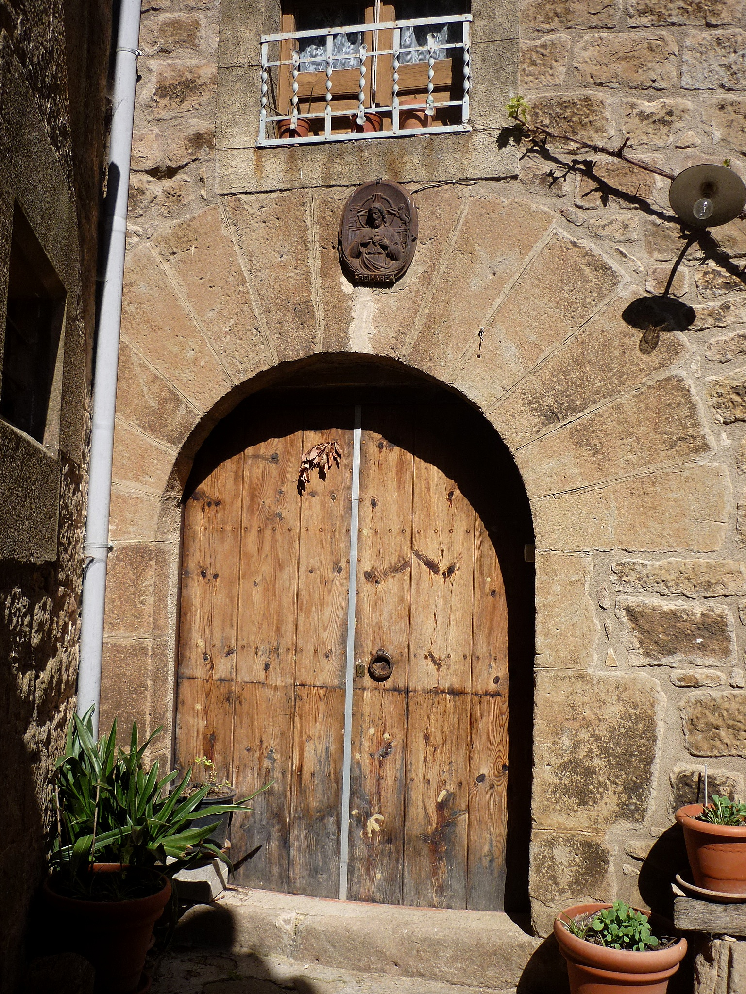 Portal de la casa la Torre a la placeta davant de l'esglèsia de Sant Just d'Ardèvol